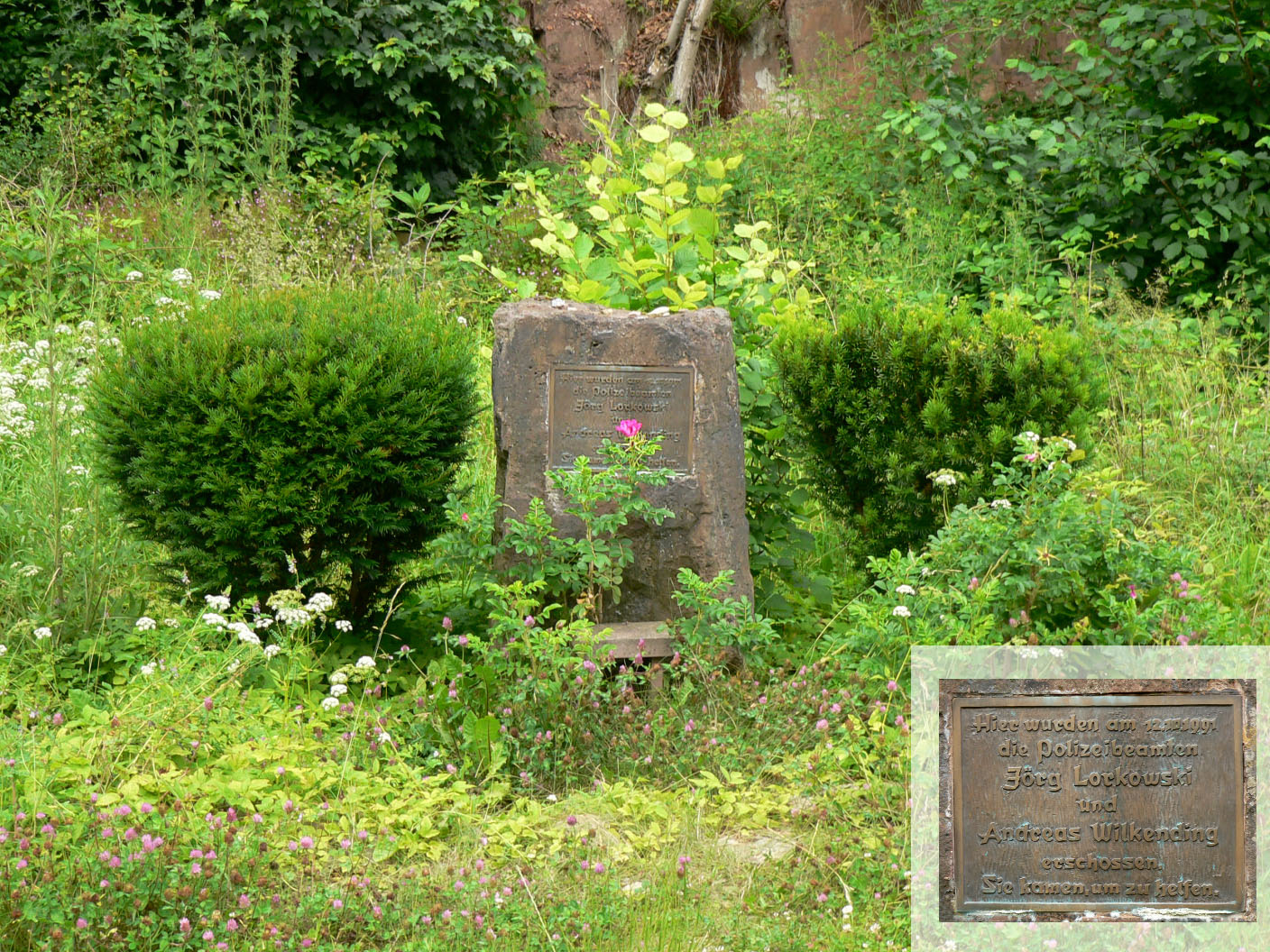 Waldparkplatz Rottmündetal im Solling zur Erinnerung an den Polizistenmord